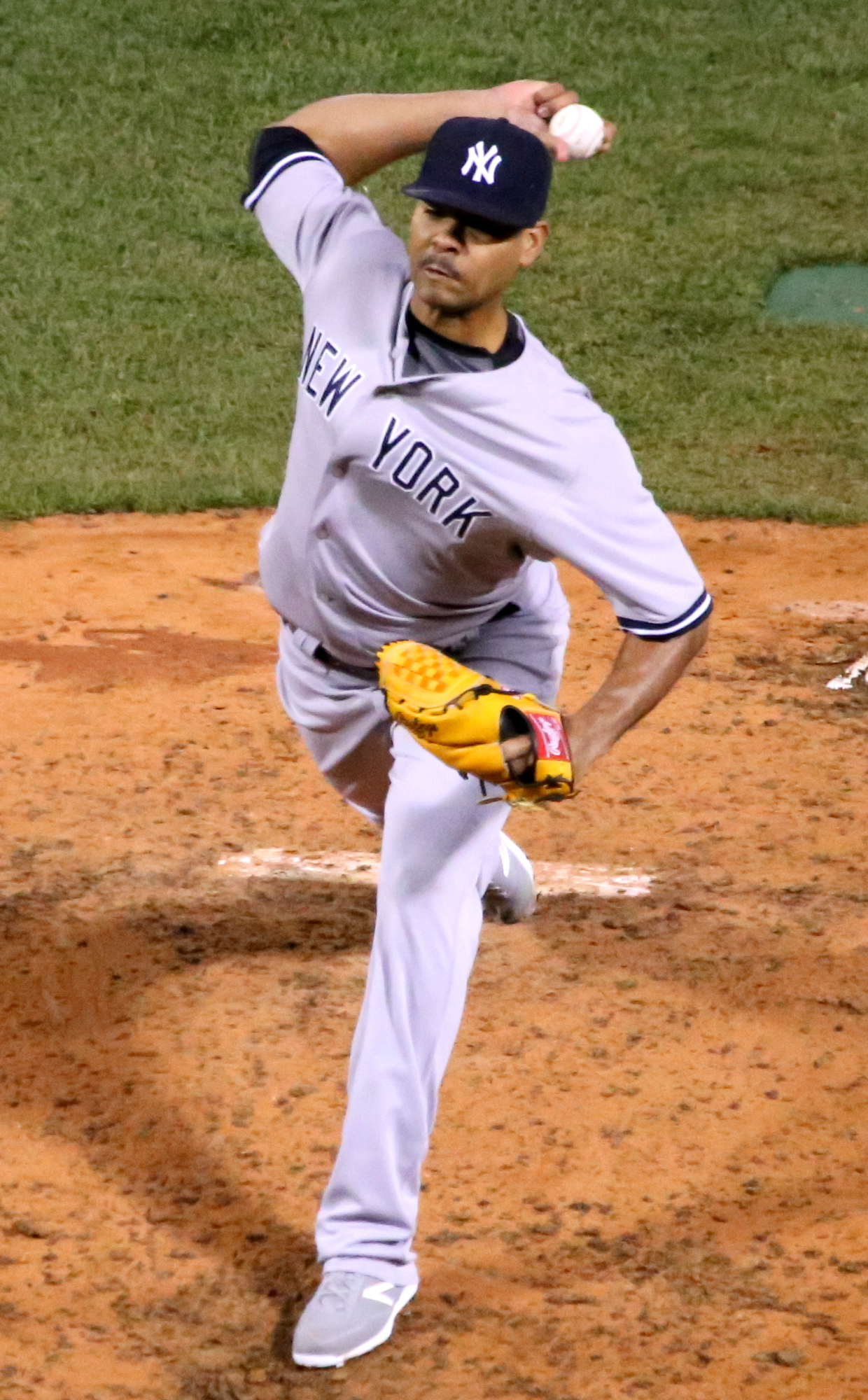 Esmil Rogers